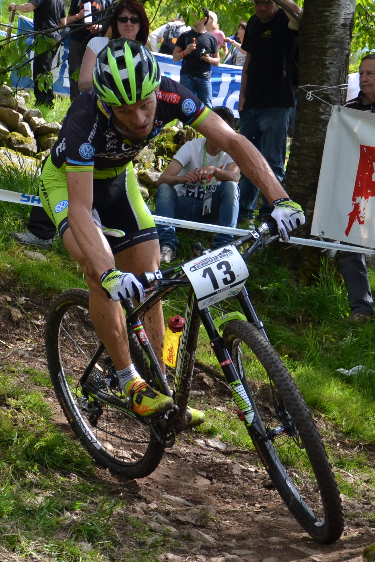 Ralph Naef lors de la 4e manche de la coupe du monde de VTT 2012 à La Bresse (FRA).